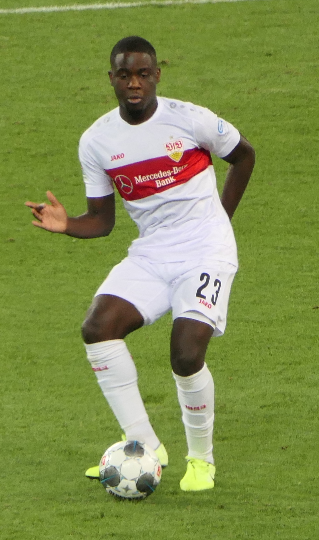 Der Fussballprofi Orel Mangala im Trikot vom VfB Stuttgart beim Heimspiel gegen den VfL Bochum am 02.09.2019.